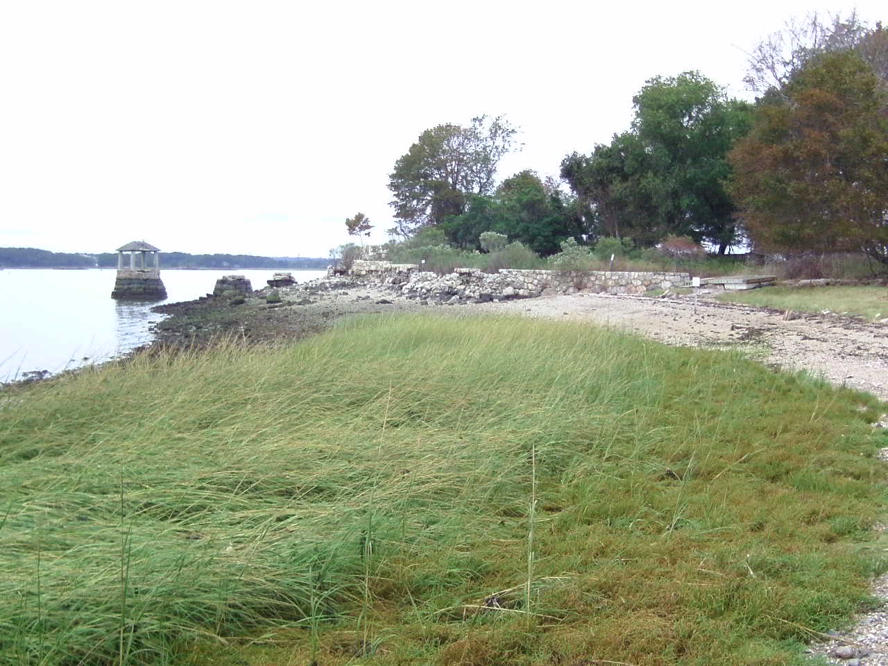 Reste einer Villa uf Sheffield Island, Connecticut, USA